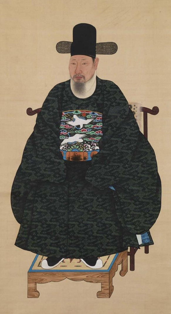 윤급 초상(尹汲 肖像), 대한민국 보물 제1496호